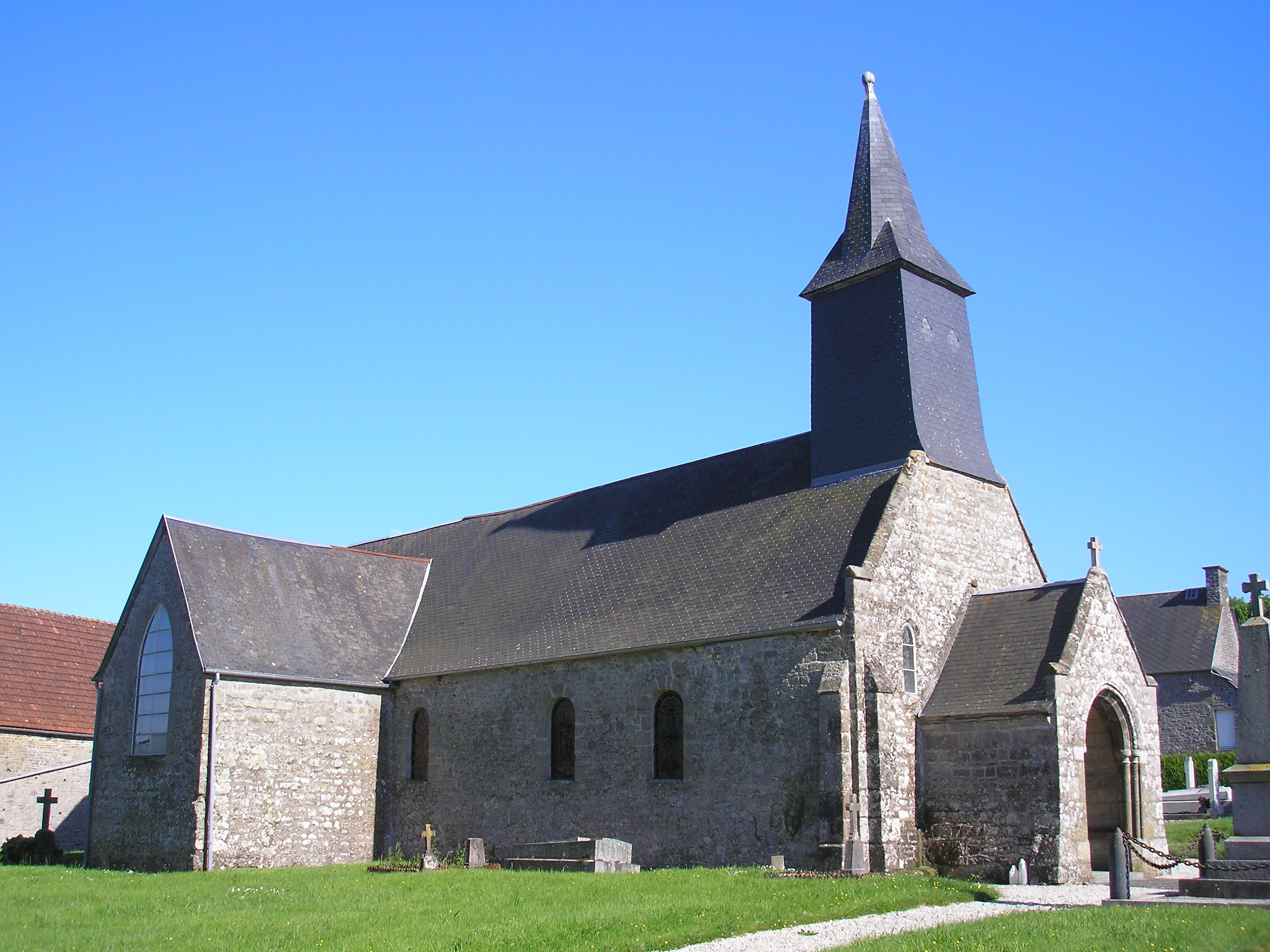 Saint-Louet-sur-Vire (Normandie, France). L'église Saint-Lô.